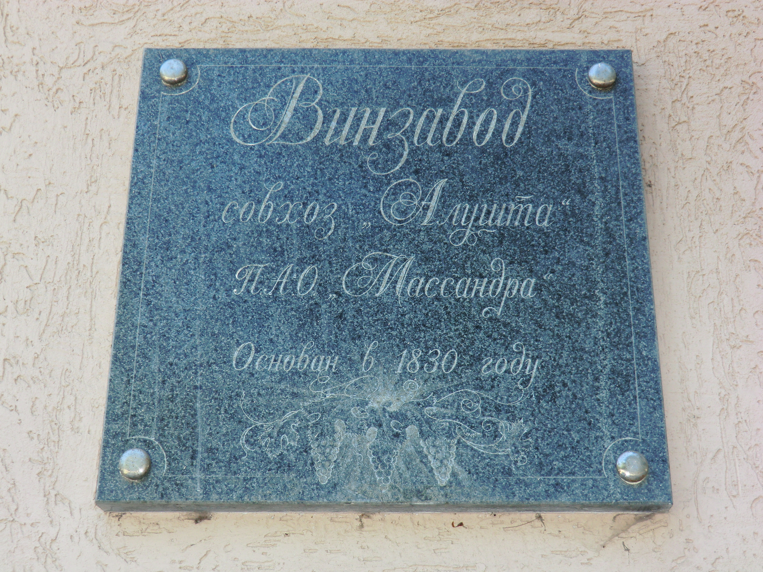 Табличка с датой основания винодельческого предприятия «Алушта» (ГП «Алушта») входящего в состав НПАО «Массандра»